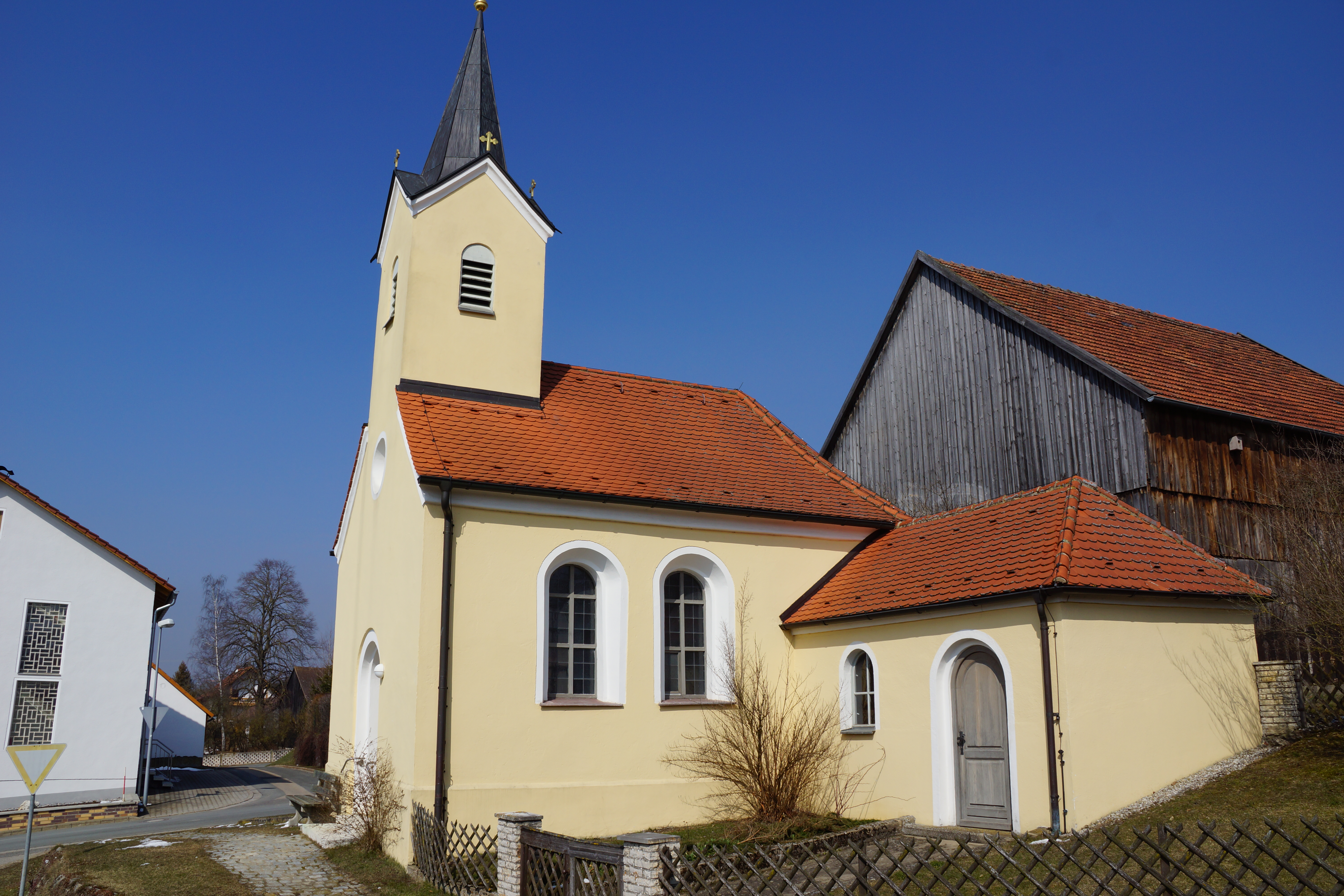 Die kleine katholische Ortskapelle / Filialkirche Zu unserer Lieben Frau im oberpfälzischen Freihausen bei Seubersdorf